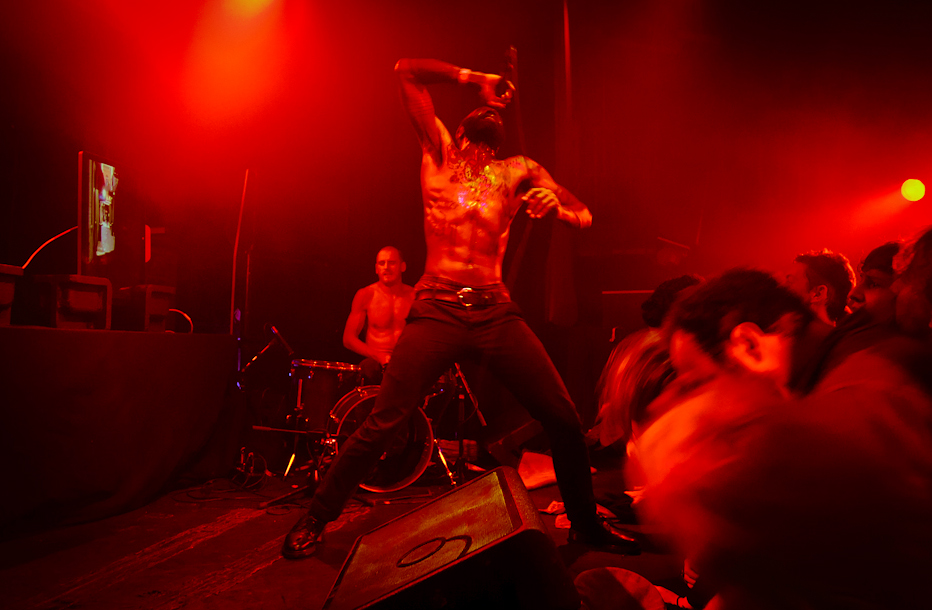 Festsaal Kreuzberg, Berlin